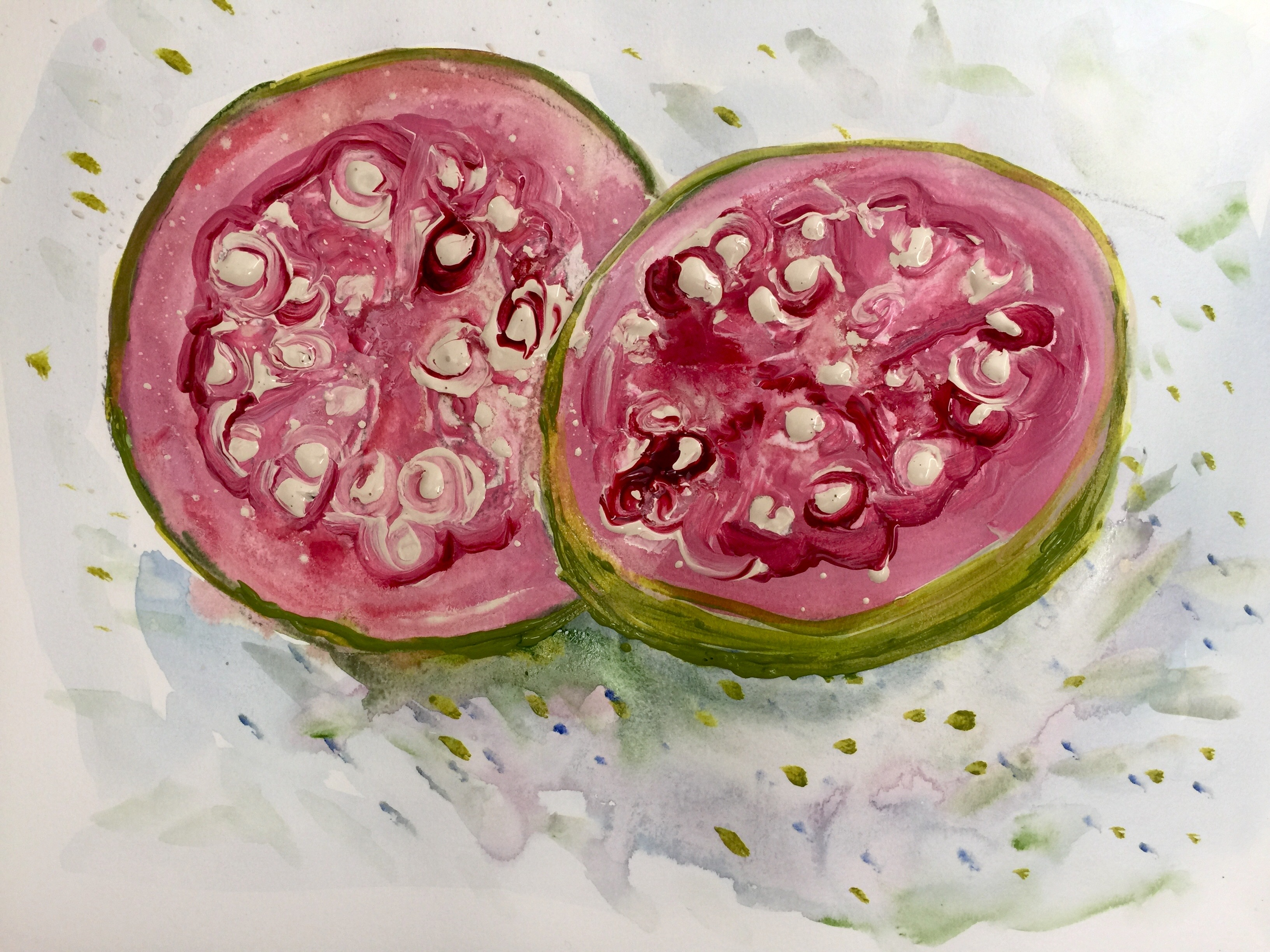 Pienk guava in waterverf en akriel.